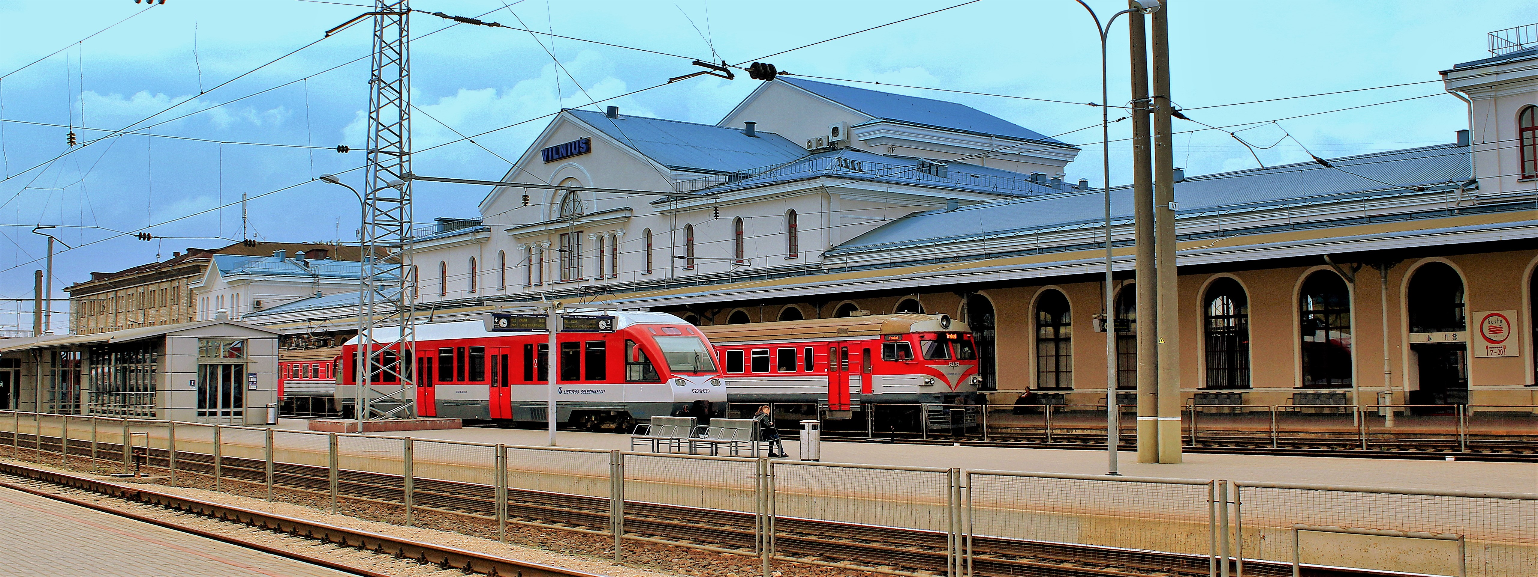 VILLINUS STATION LITHUANIA SEP 2013